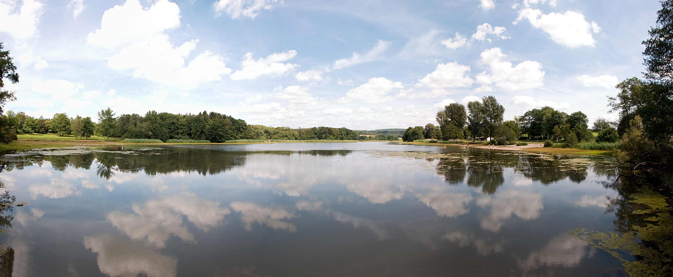 Der Gederner See bei Gedern im Wetteraukreis, Deutschland.